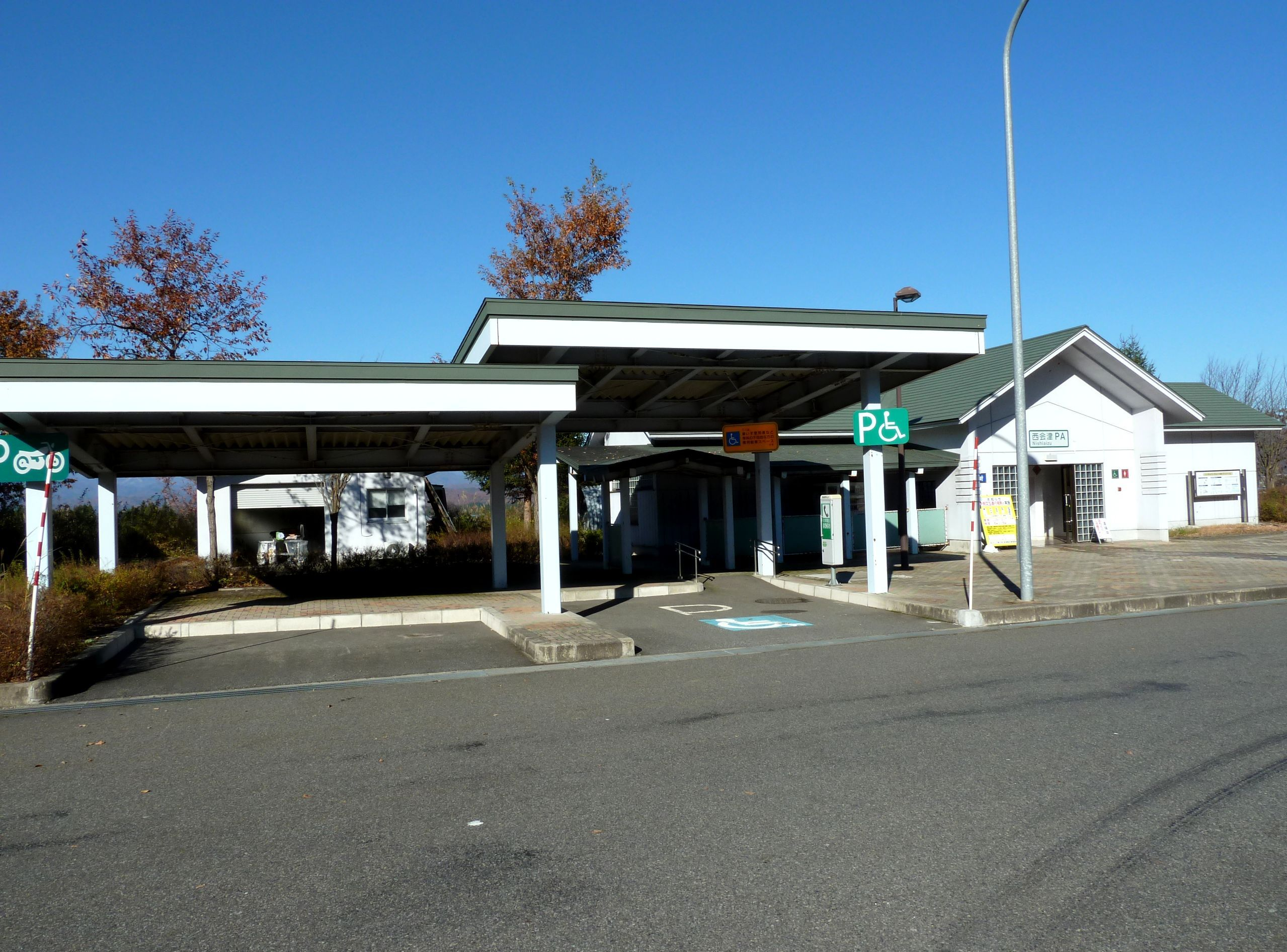 磐越自動車道 西会津パーキングエリア（上り線）